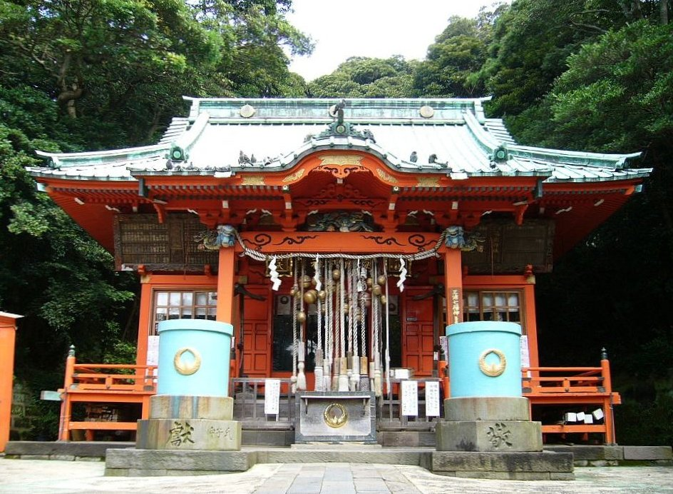 海南神社 拝殿